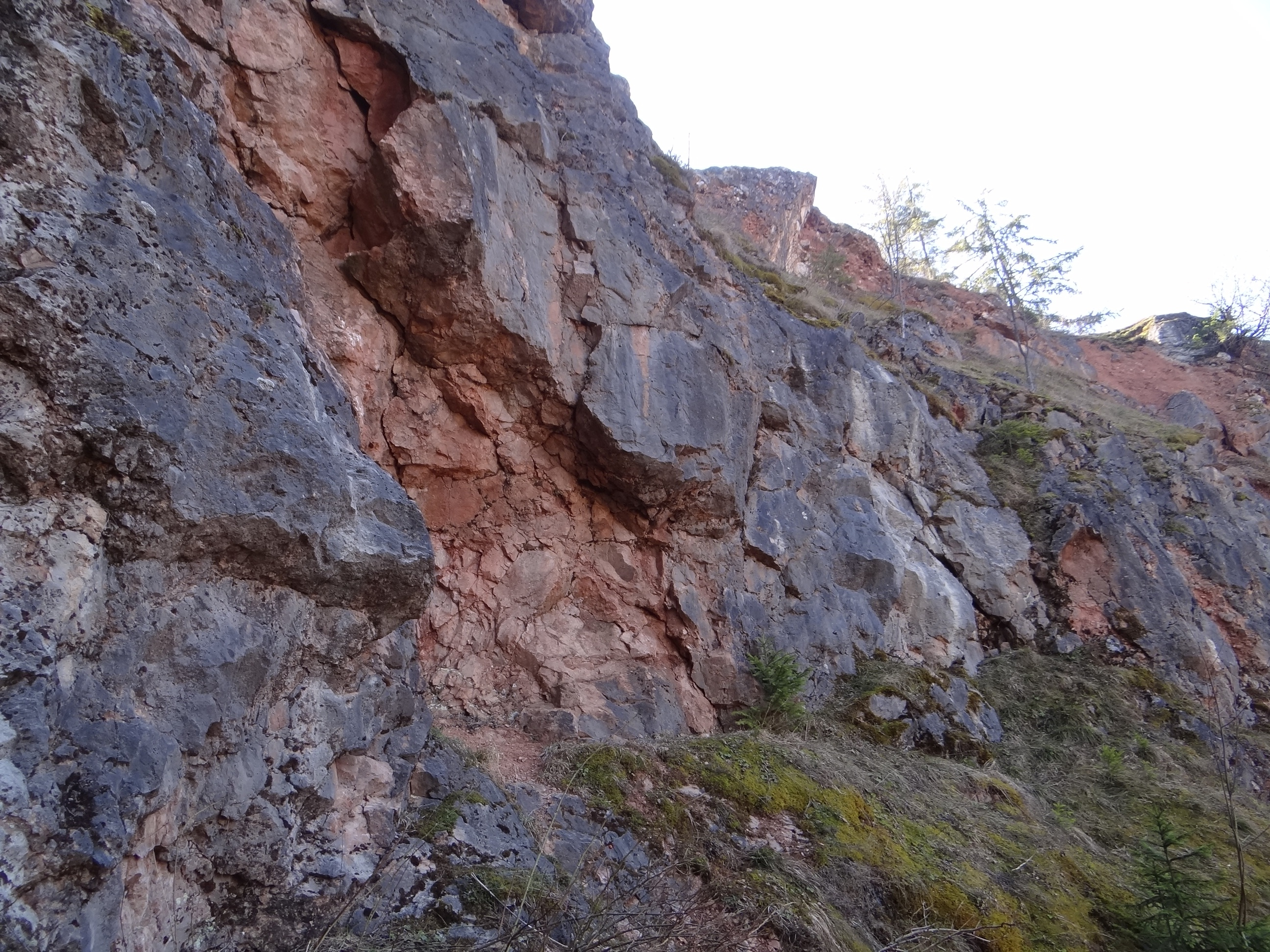 Rezerwat przyrody Rogoźnicka Skałka